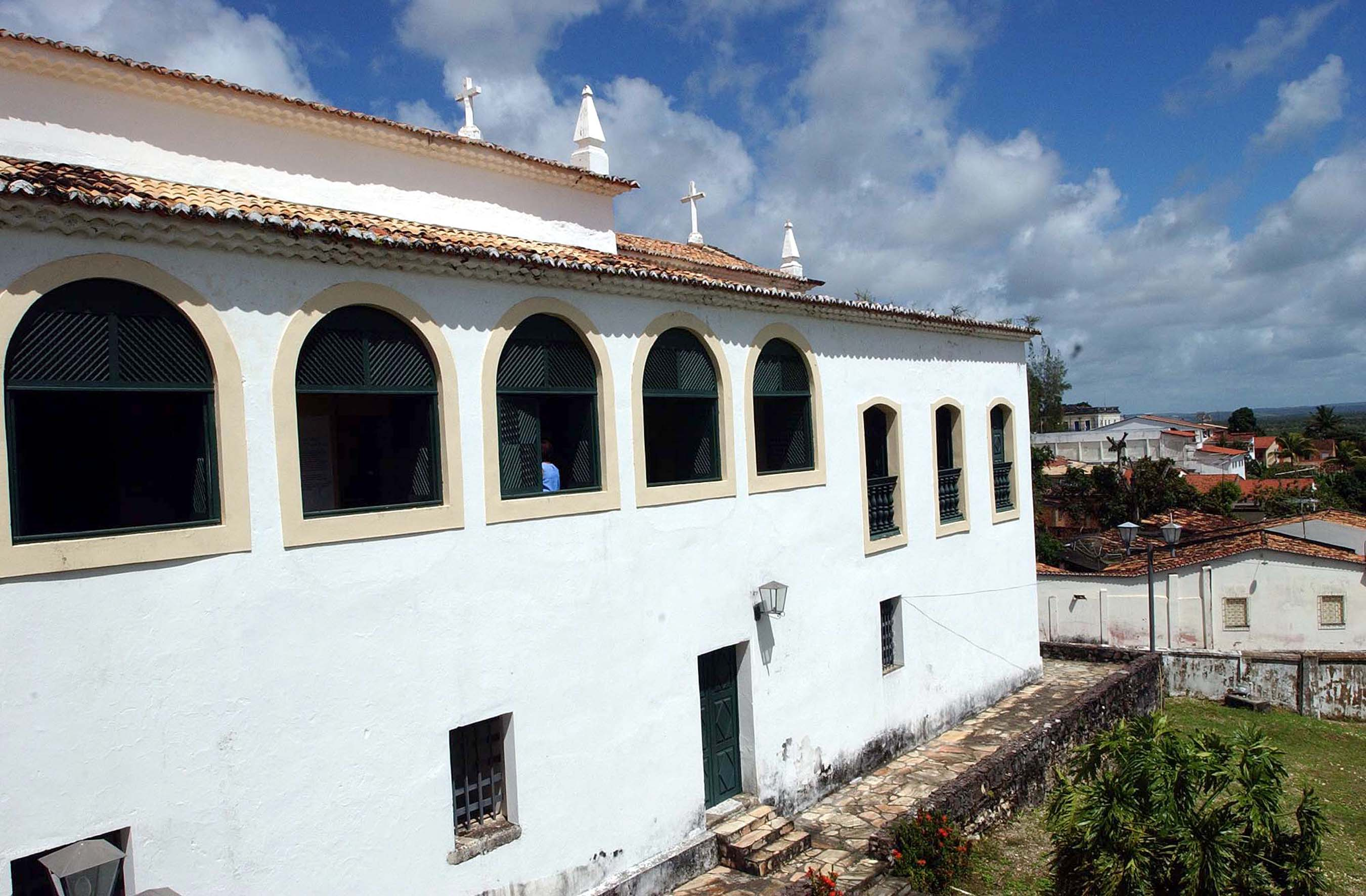 São Cristóvão, SE - Detalhes do Convento da Santa Cruz, no muncípio de São Cristóvão, antiga capital de Sergipe. Foto: Wilson Dias/ABr